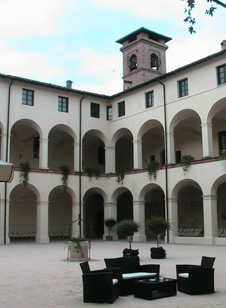 Fontevivo (31) - chiostro della Pieve di San Bernardo